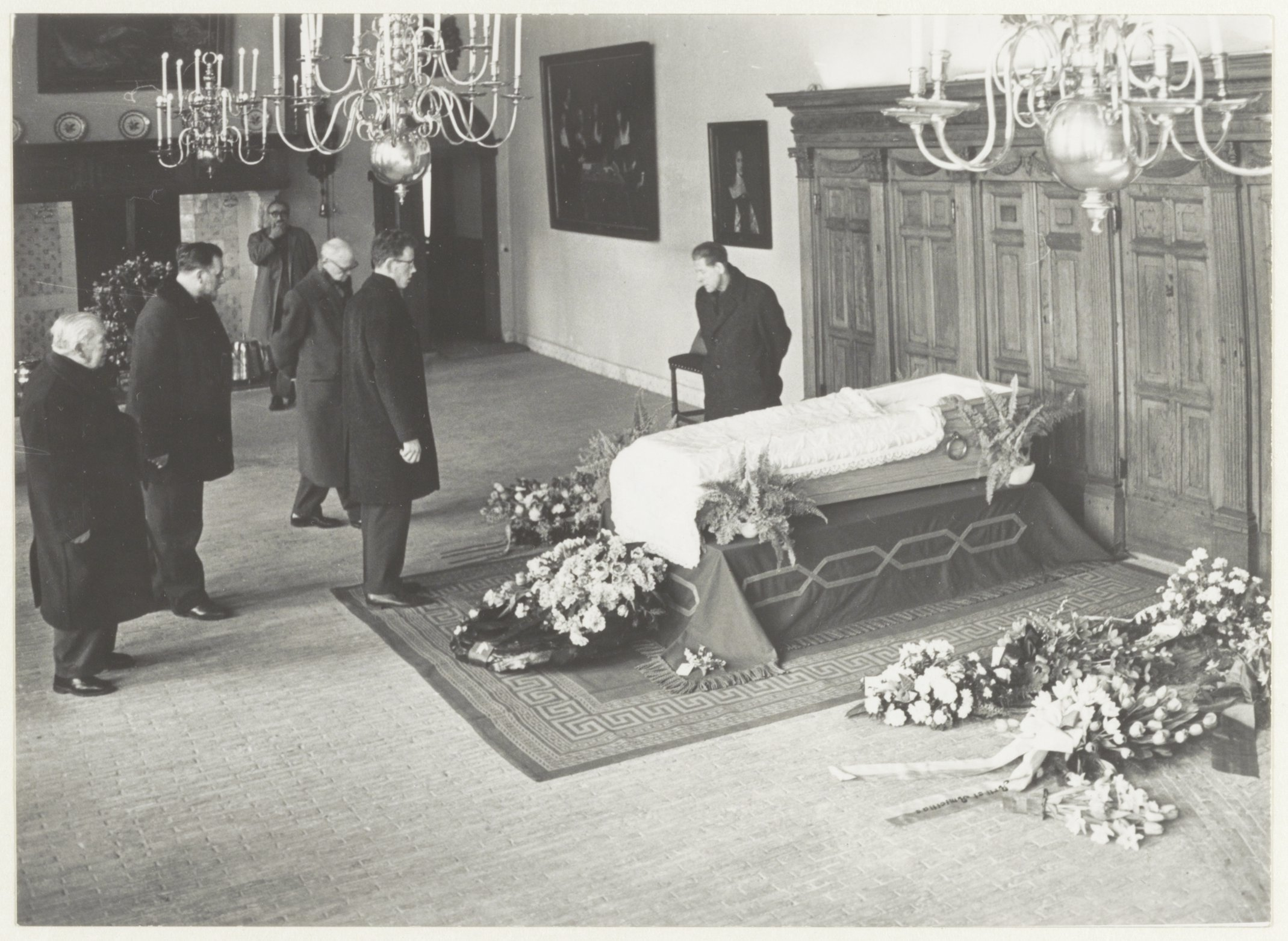 CollectieCollectie Fotoburo de BoerInventarisnummerNL-HlmNHA_54008960NL-HlmNHA_1478_664KBeschrijvingOpbaring van de Haarlemse schilder H.F. Boot in het Frans Halsmuseum.FotonummerNL-HlmNHA_1478_3173DocumenttypeHistorieprenten, tekeningen en foto'sVervaardigerBoer, Cees de (1918-1985) Soort vervaardigerFotograaf Interieur/ExterieurInterieurLandNederland ProvincieNoord-Holland GemeenteHaarlem PlaatsHaarlem StraatGroot Heiligland GeografischCentrum Begindatum07-03-1963Einddatum07-03-1963Datering gebeurtenis07-03-1963TechniekFoto TrefwoordenMusea, begrafenissen